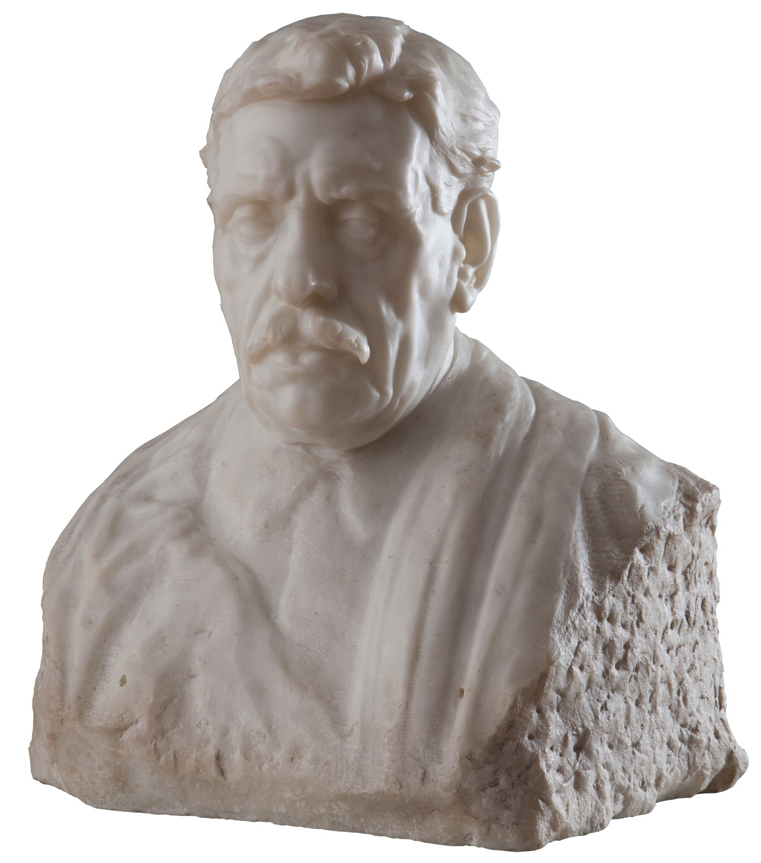 Nombre, Alexandre Falguière. 1903. 49 x 38,5 x 30 cm, talla en mármol. Inv. 3608.